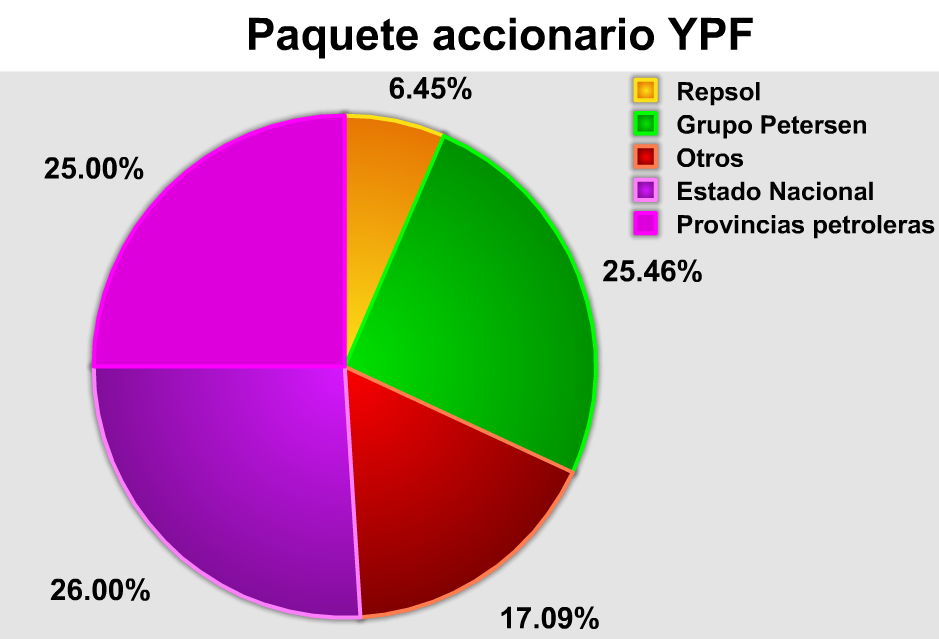 Paquete acionario de YPF, expropiado por el Estado Nacional Grupo Petersen (25,46%) Otros (17,09%) Estado Nacional (51%) Repsol (6,45%)